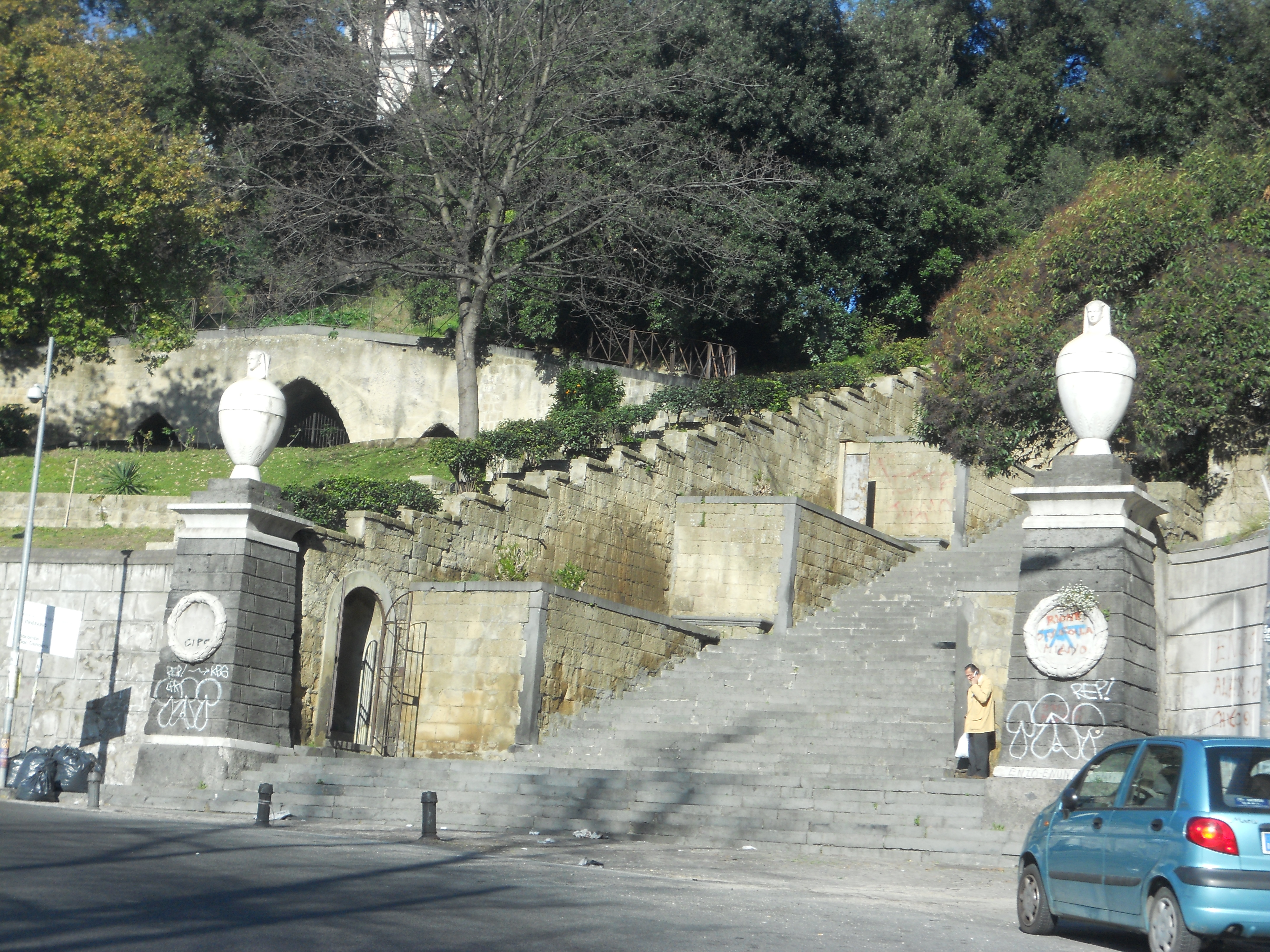 Napoli: Gradini Capodimonte, raggiungibili dinanzi al tondo di Capodimonte e che permettono di accedere ai giardini della Principessa Iolanda